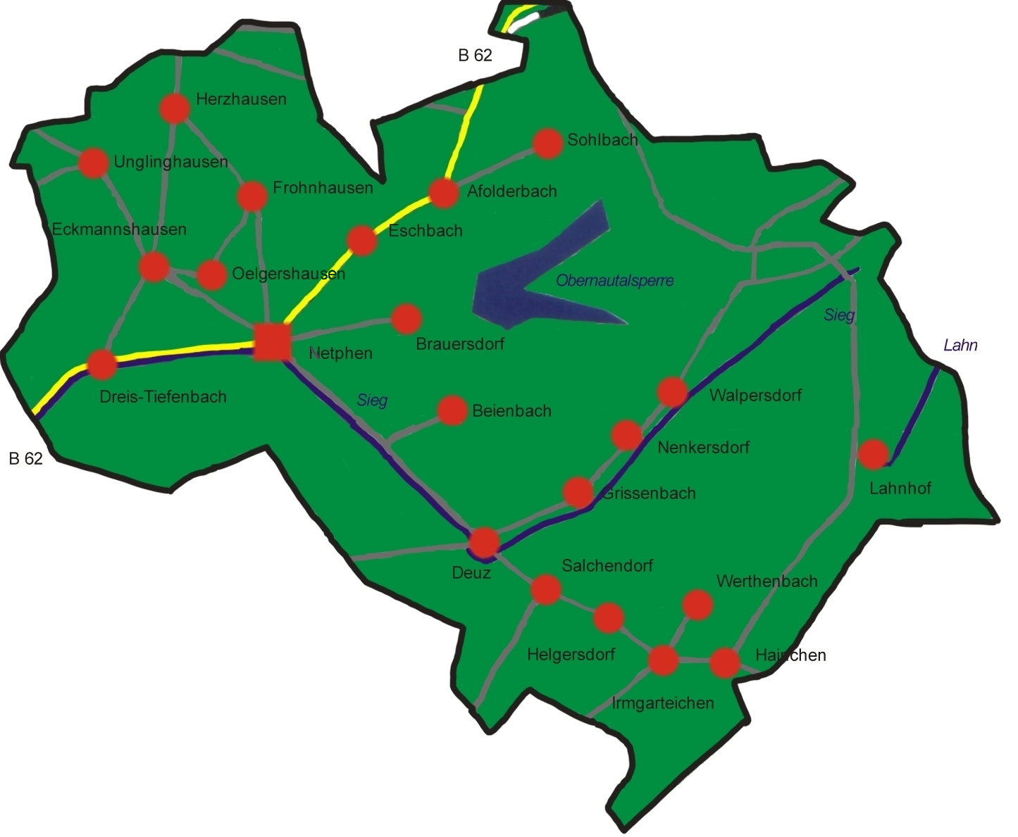 Stadtgliederung Netphen